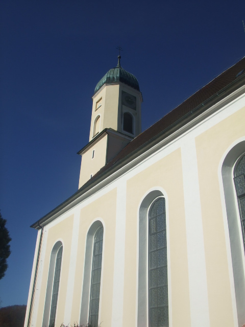 Pfarrkirche St. Michael, Salmendingen, Stadt Burladingen